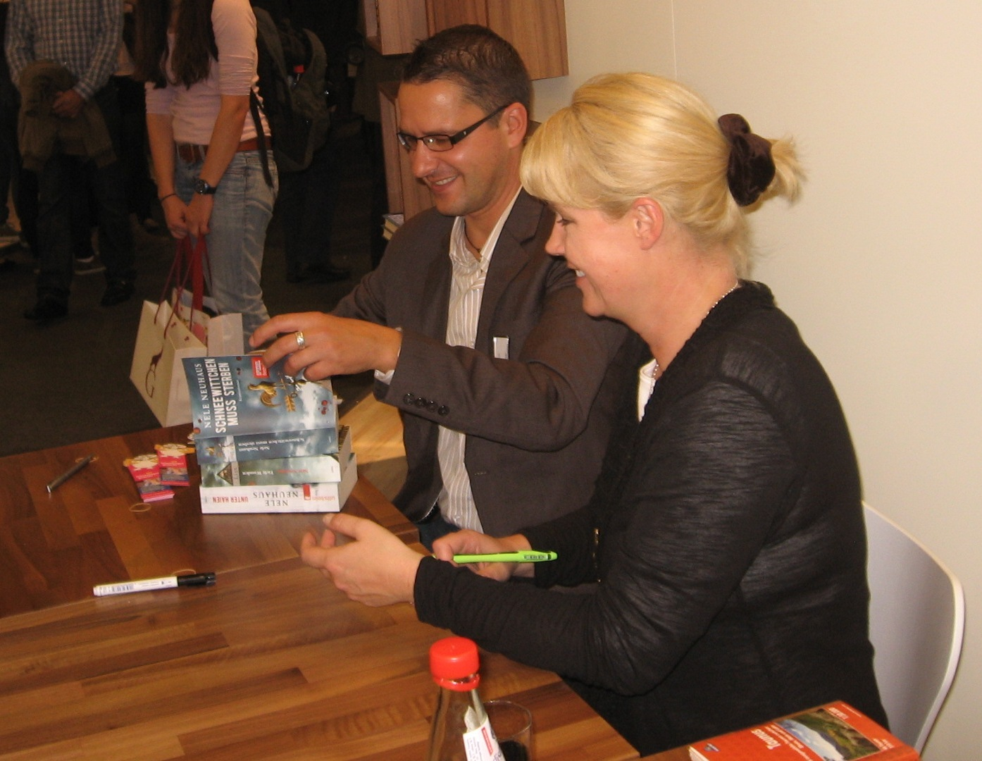 Nele Neuhaus mit einem Mitarbeiter des Ullstein Verlages beim signieren von Büchern auf der Frankfurter Buchmesse.